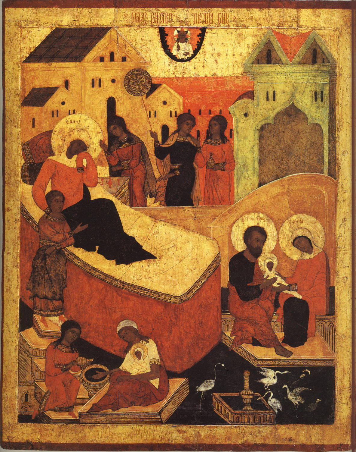 Икона "Рождество Богородицы", XVII в. Место хранения: Государственный музей-заповедник " Коломенское ", Москва Реставрация: Реставрирована в объединении "Росреставрация", реставратор Д.Е.Брягин. Размер: 102 х 82 см Материал: Дерево, левкас, темпера Персоналии: Богородица, праведная Анна, праведный Иоаким, служанки Иконографическая справка: Интересной иконографической особенностью данной иконы является изображение фонтана с бассейном и белыми птицами. Появление павлинов и других птиц перед водоемом в иконе восходит к "Плачу праведной Анны", в котором она сравнивает себя с птицами.